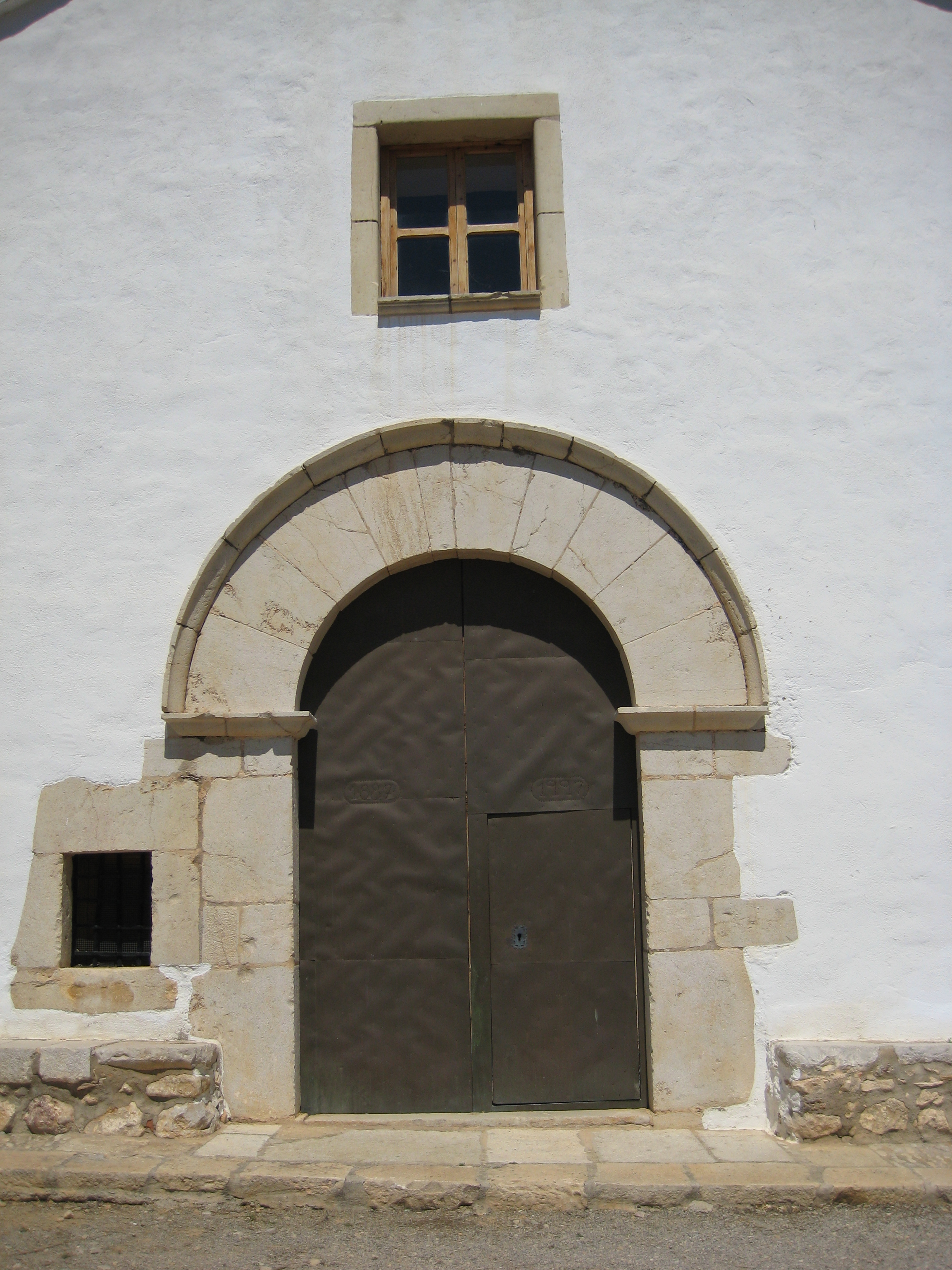 Porta de l'ermita de Sant Vicent Ferrer de les Coves de Vinromà (Plana Alta)